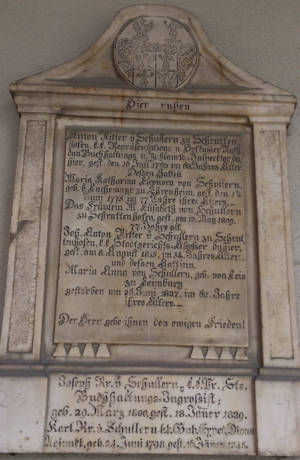 Grabplatte der Familie Ritter von Schullern zu Schrattenhofen in den Arkaden des Westfriedhof in Innsbruck.